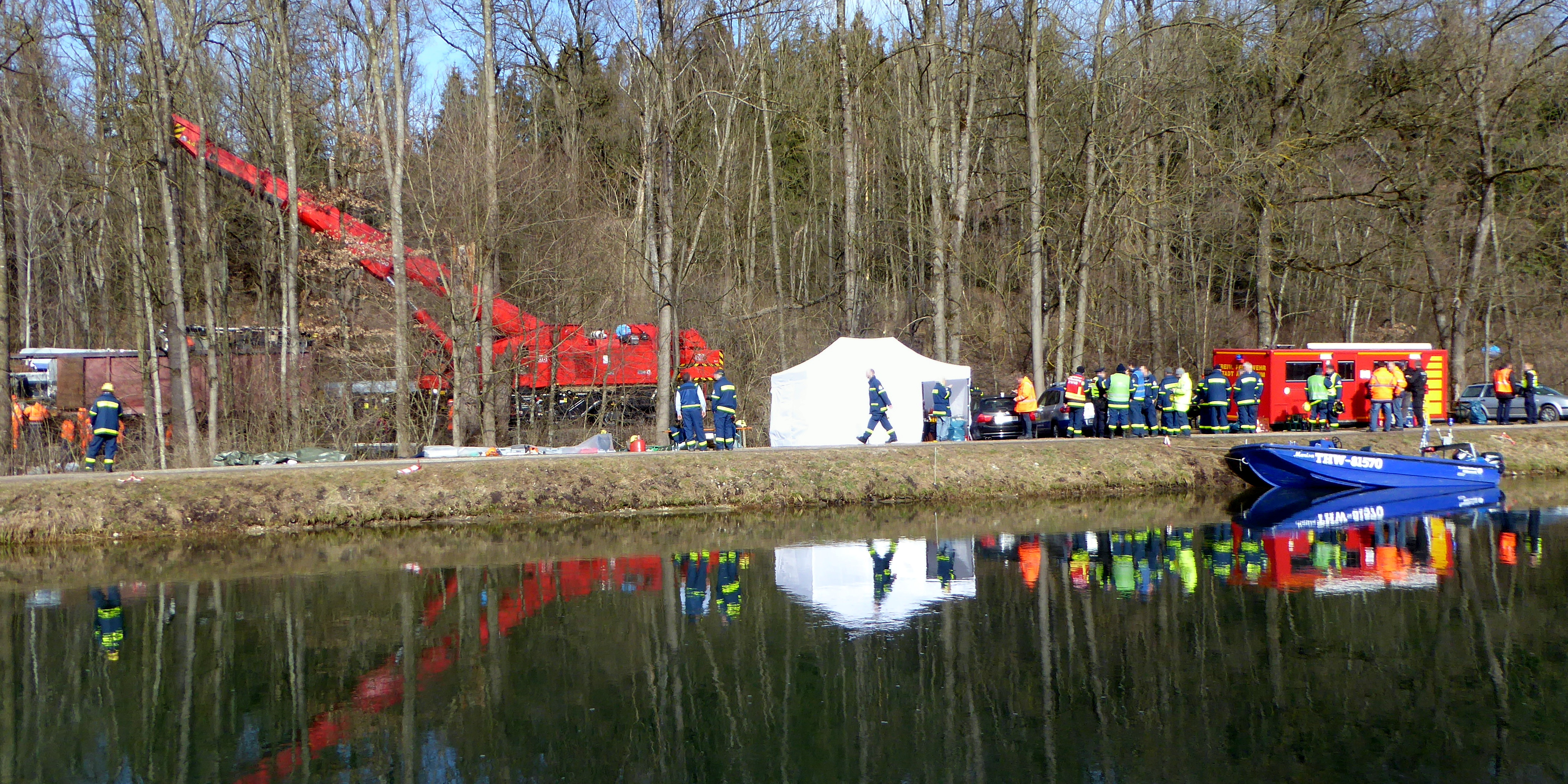 Bergung der Trümmer der am 2016-02-09 verunglückten Meridian-Züge westlich von Kolbermoor am Ufer des Mangfall­kanals. Rechts ein Boot des THW.